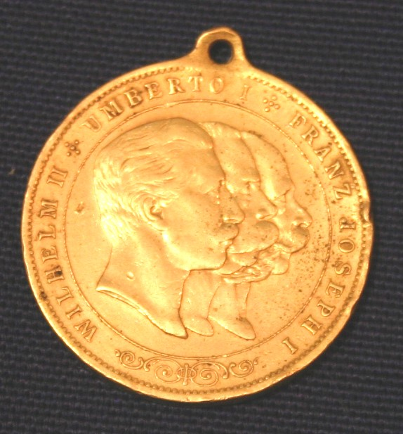 Bild Medaille Dreibund